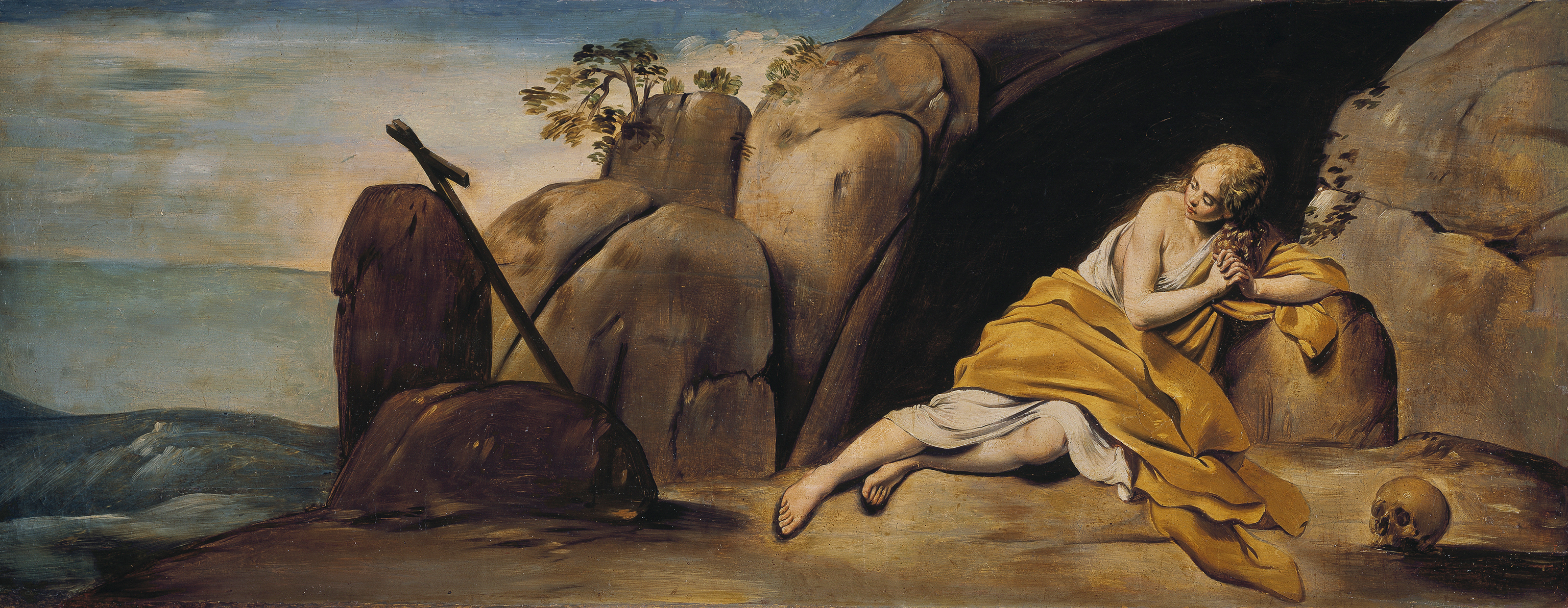 La obra representa a Santa María Magdalena en actitud penitente.